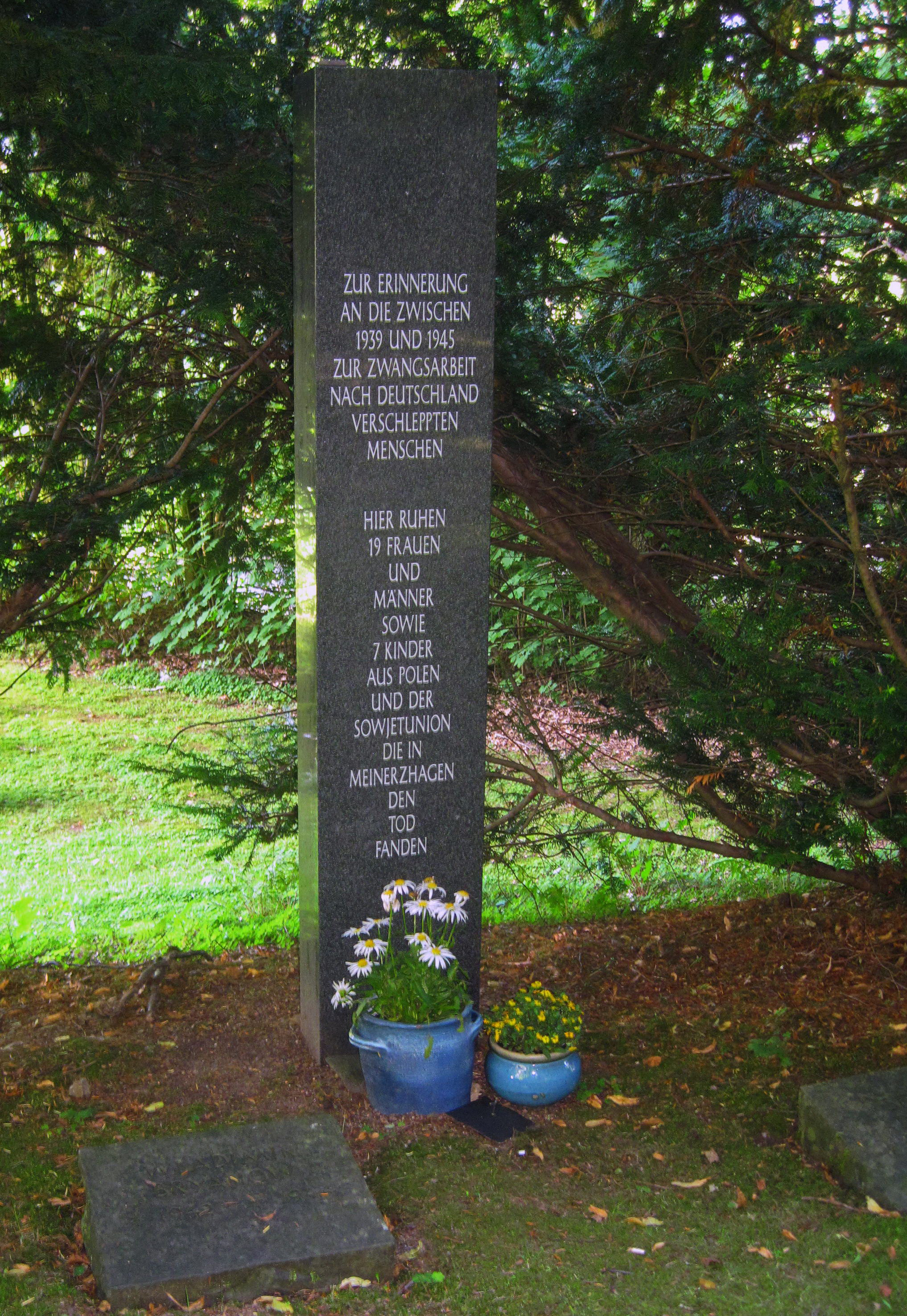 Neuer jüdischer Friedhof in Meinerzhagen, Heerstraße This image shows a heritage building in Germany, located in the North Rhine-Westphalian city Meinerzhagen (no. 46).